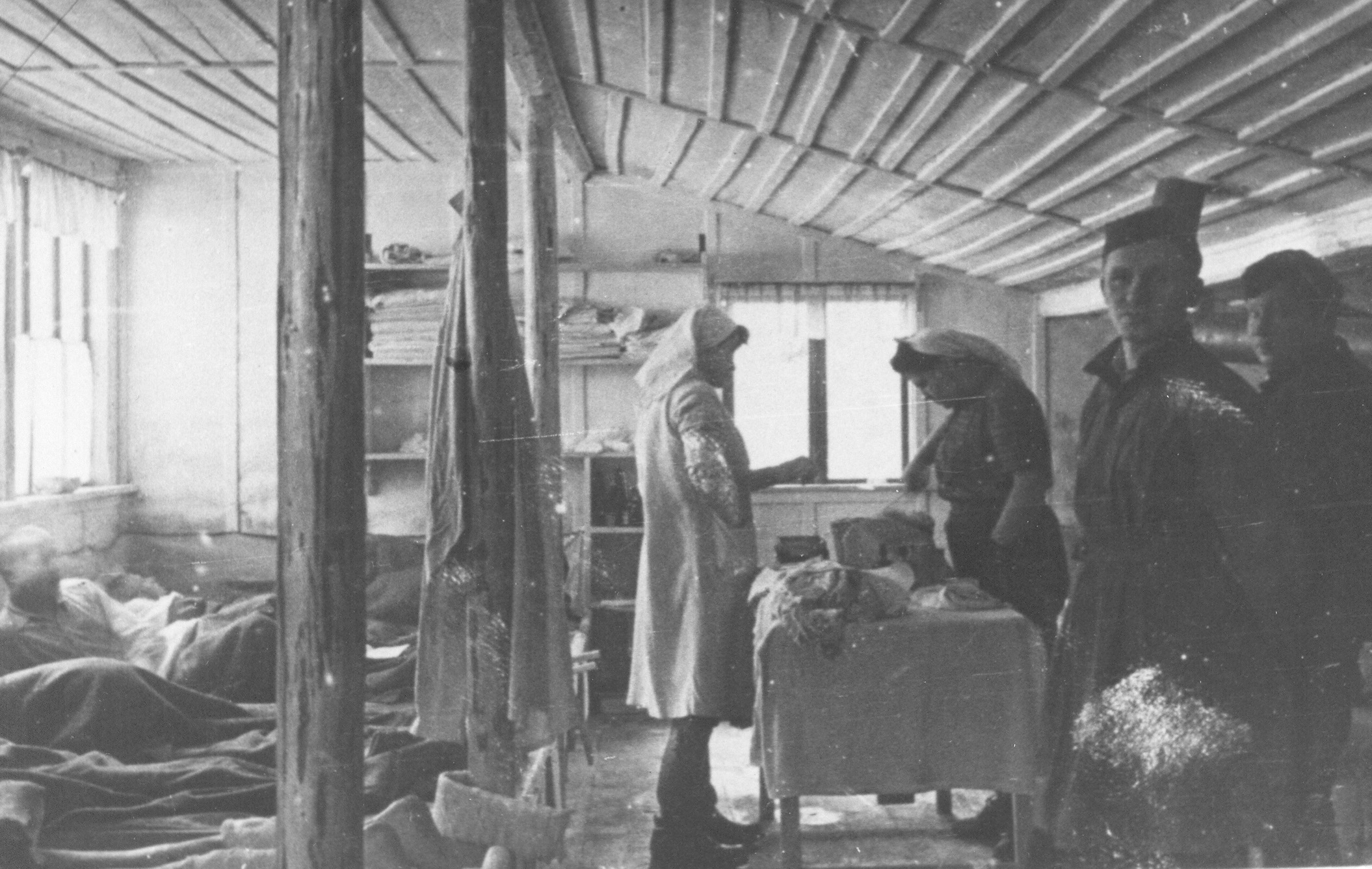 Partizanska bolnišnica Zgornji Hrastnik